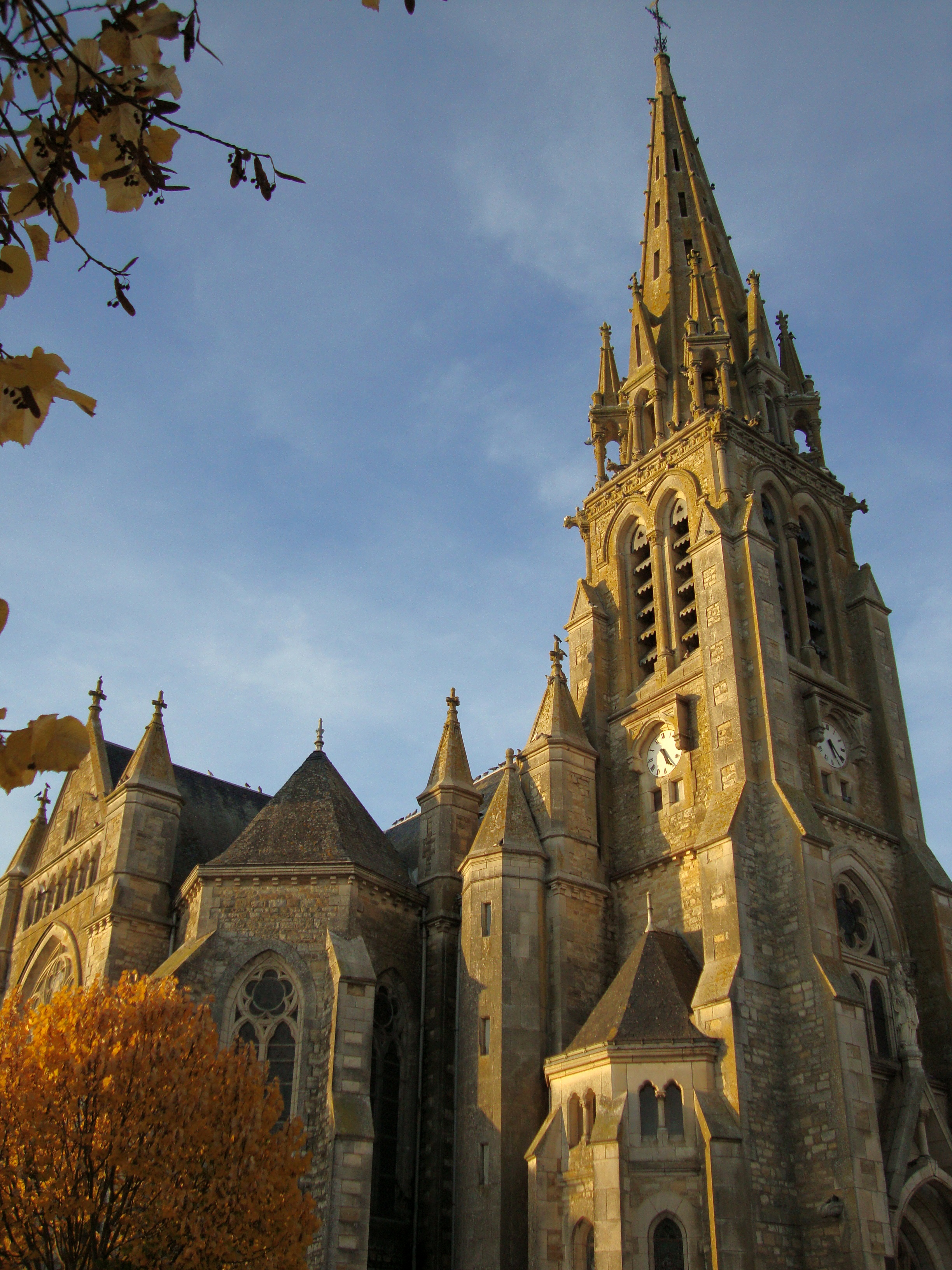 Église Sainte-Cécile de Sainte-Cécile, (Inscrit, 2007) .